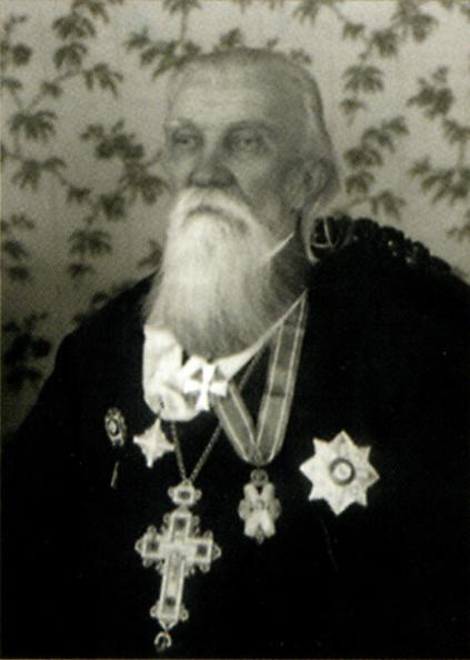 Сергей Окулов, священник